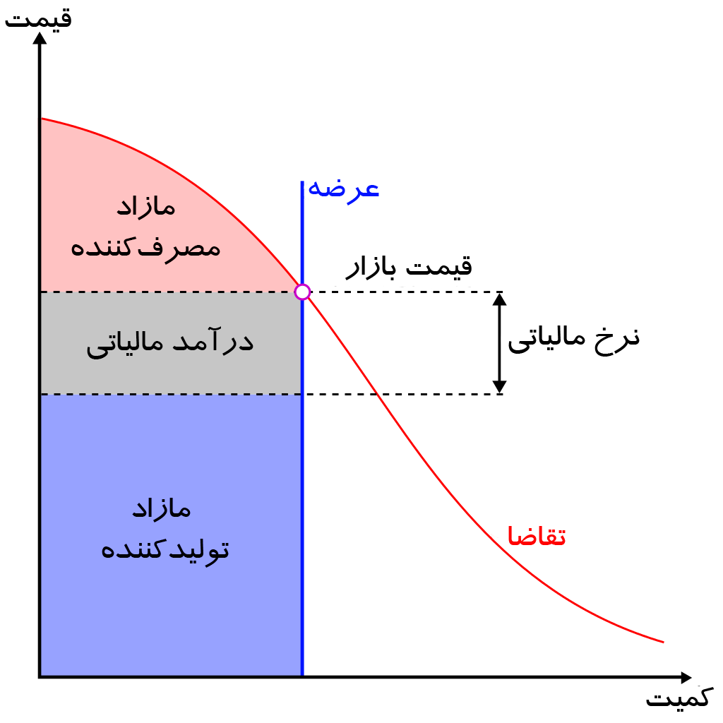 این نمودار تأثیر مالیات بر ارزش زمین بر روی عرضهٔ غیرکششی و تقاضای غیرکششی نشان می‌دهد.